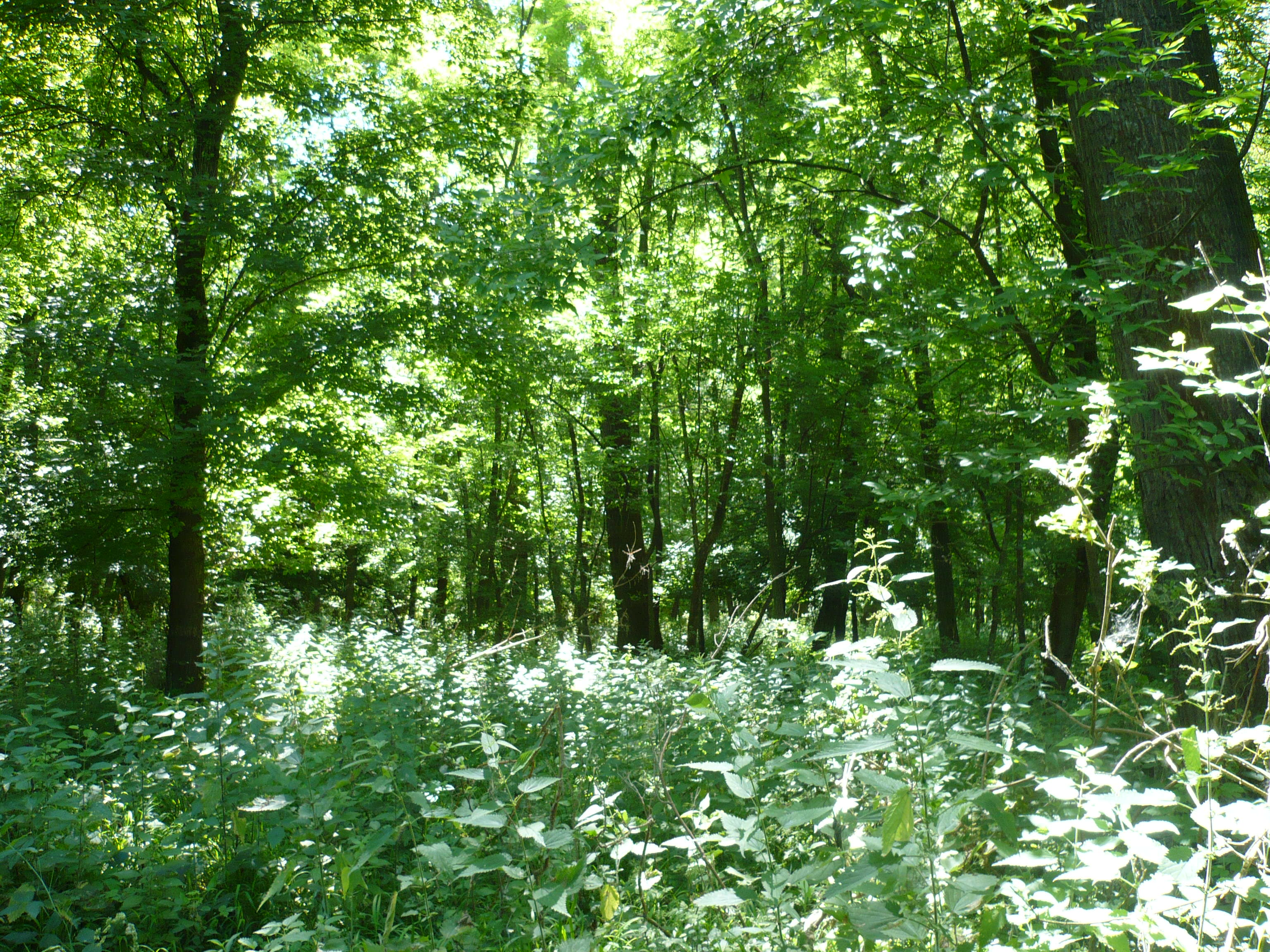 Karapancsai erdő (Szerbia)